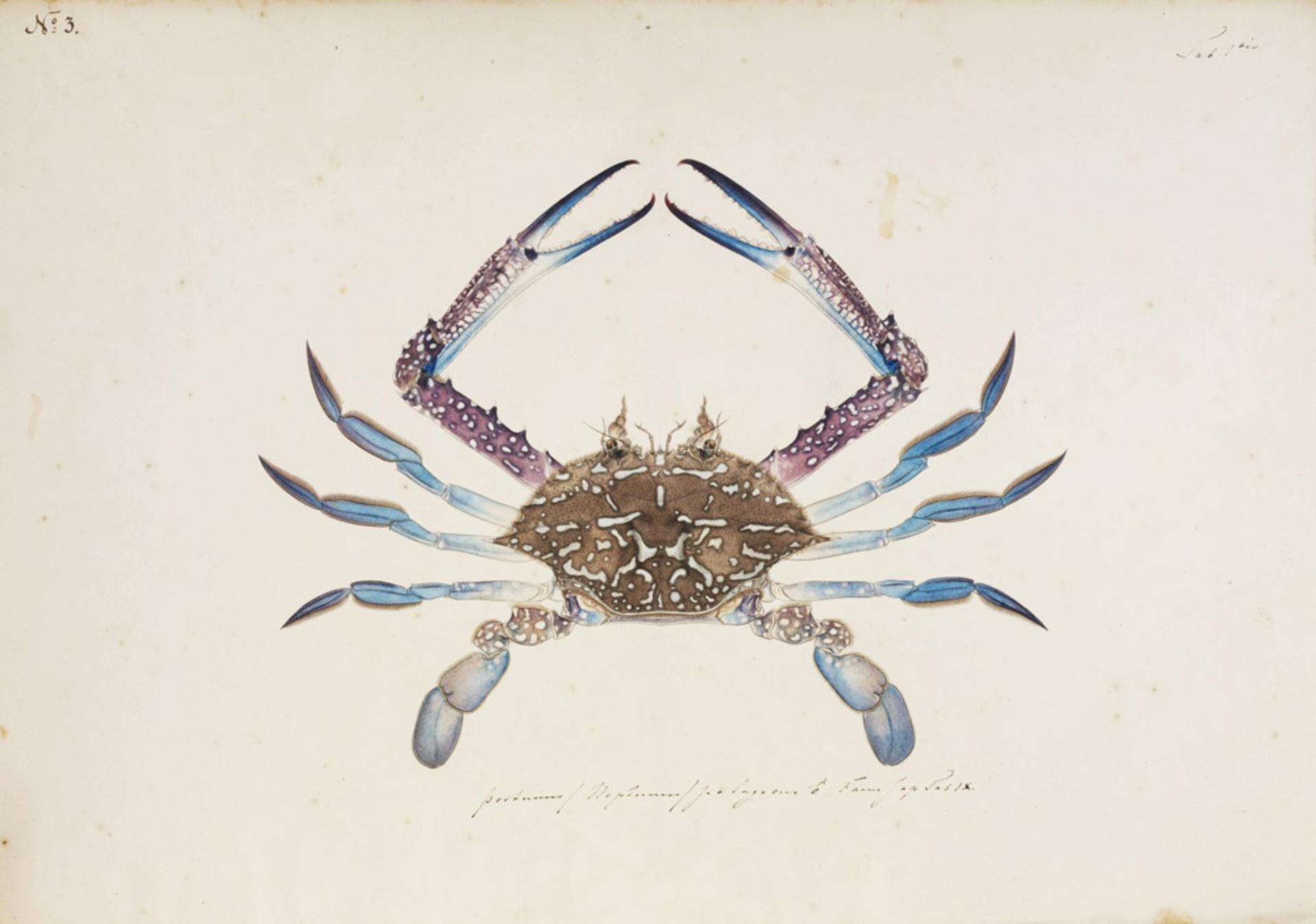 Portunus pelagicus (Linnaeus)